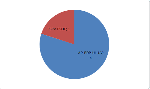 Número de concejales de las elecciones locales de 1979 en Segart